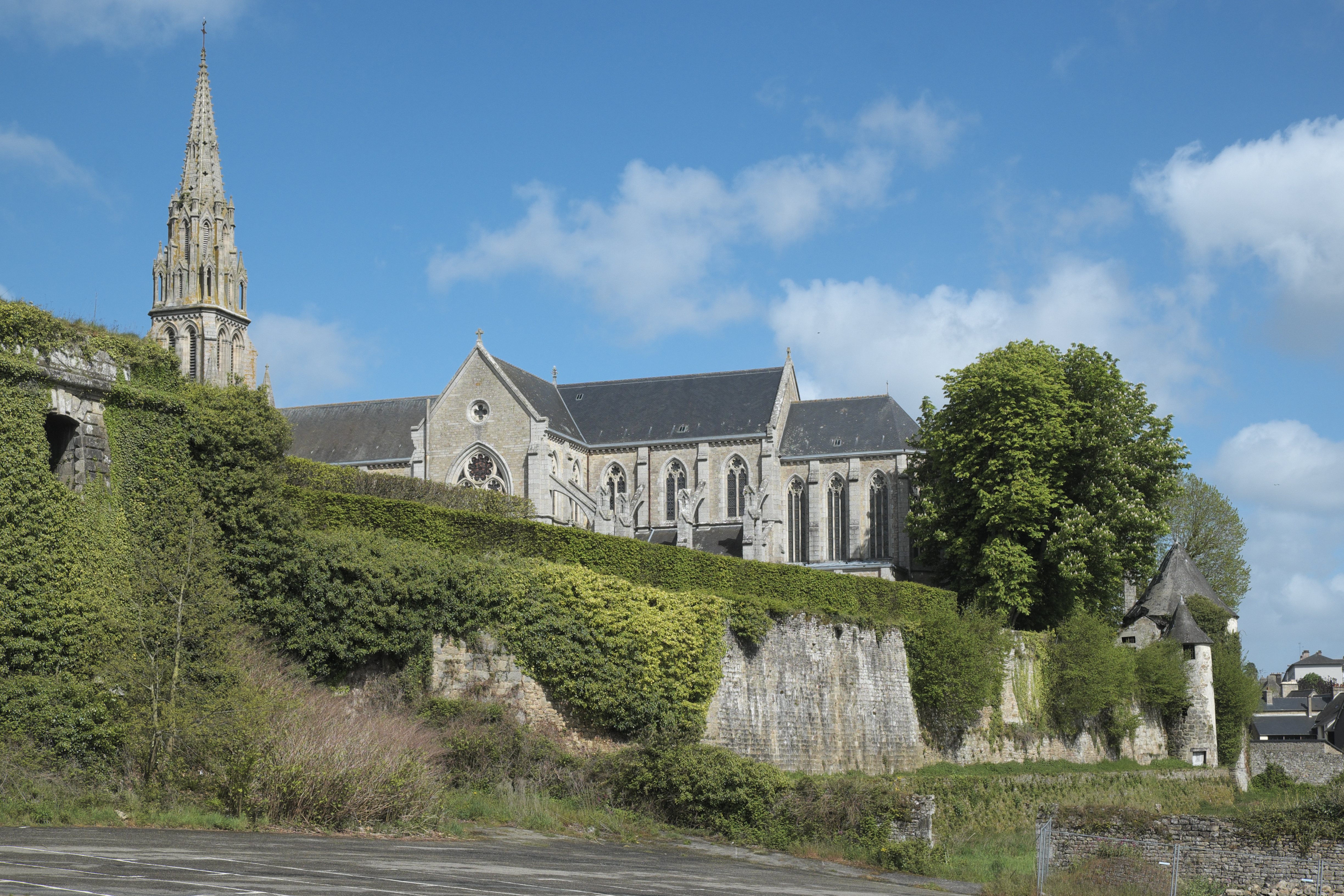 Basilika Notre-Dame-de-Délivrance in Quintin im Département Côtes-d’Armor (Region Bretagne/Frankreich)